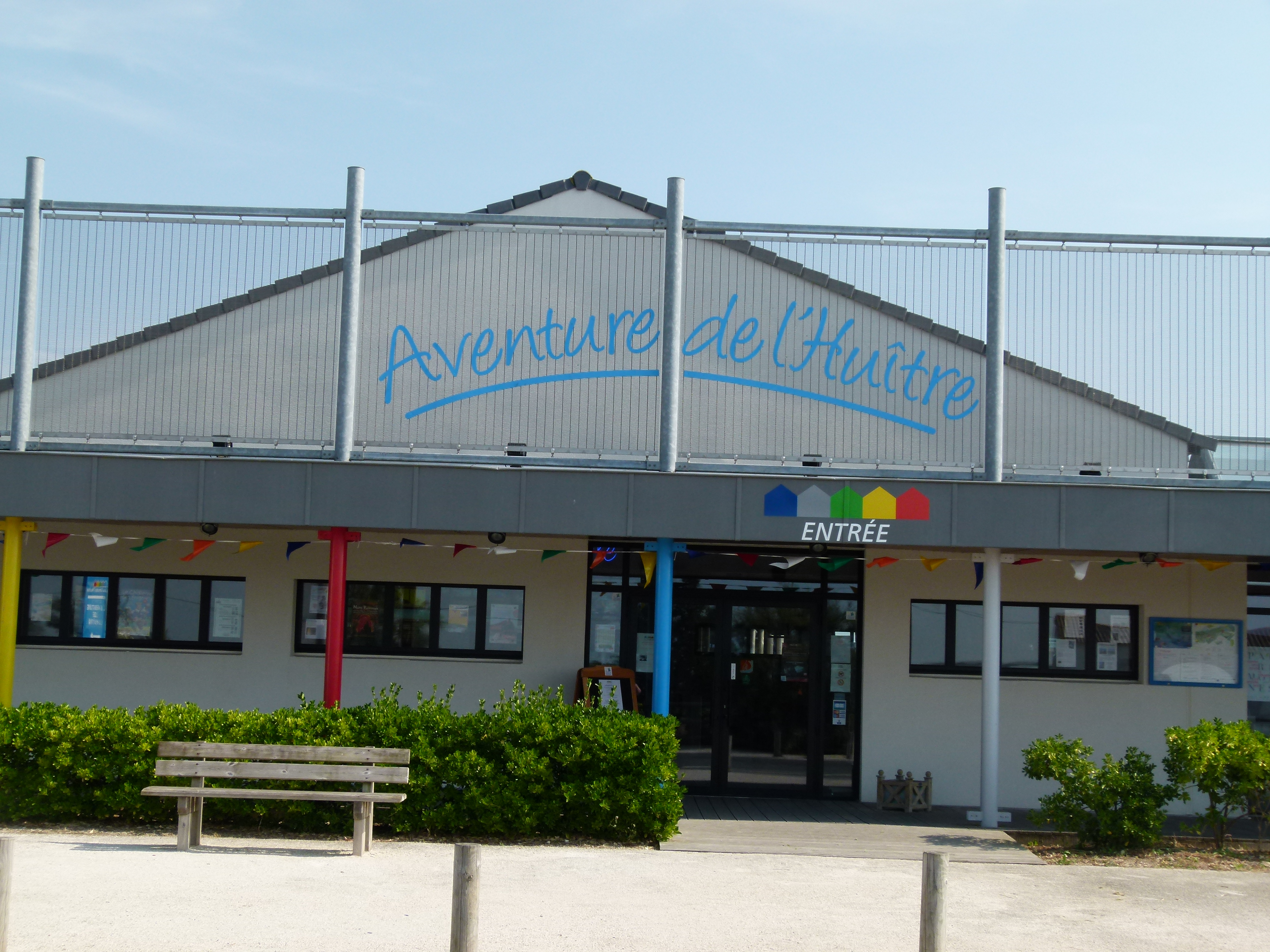 Entrée principale dans la Cité de l'Huître à Marennes (Charente-Maritime)